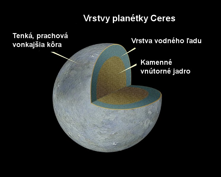 Popis: Prierez planétkou Ceres Zdroj: NASA, ESA, A. Feild (STScI) Dátum: 14.2.2006 Autor: Adrian Povolenie: PD Iné verzie tohto súboru